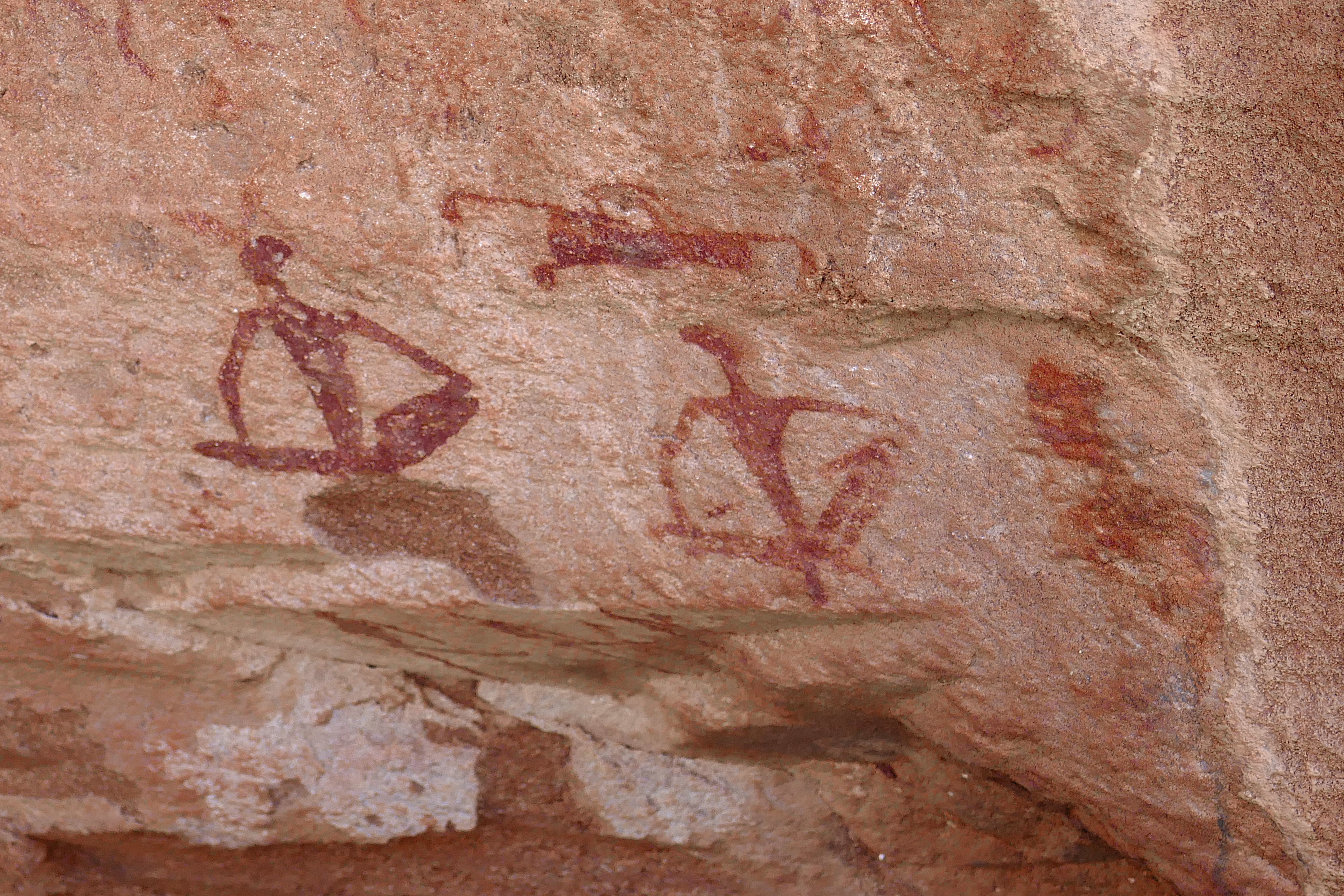 Peintures rupestres à Twyfelfontein (Namibie).